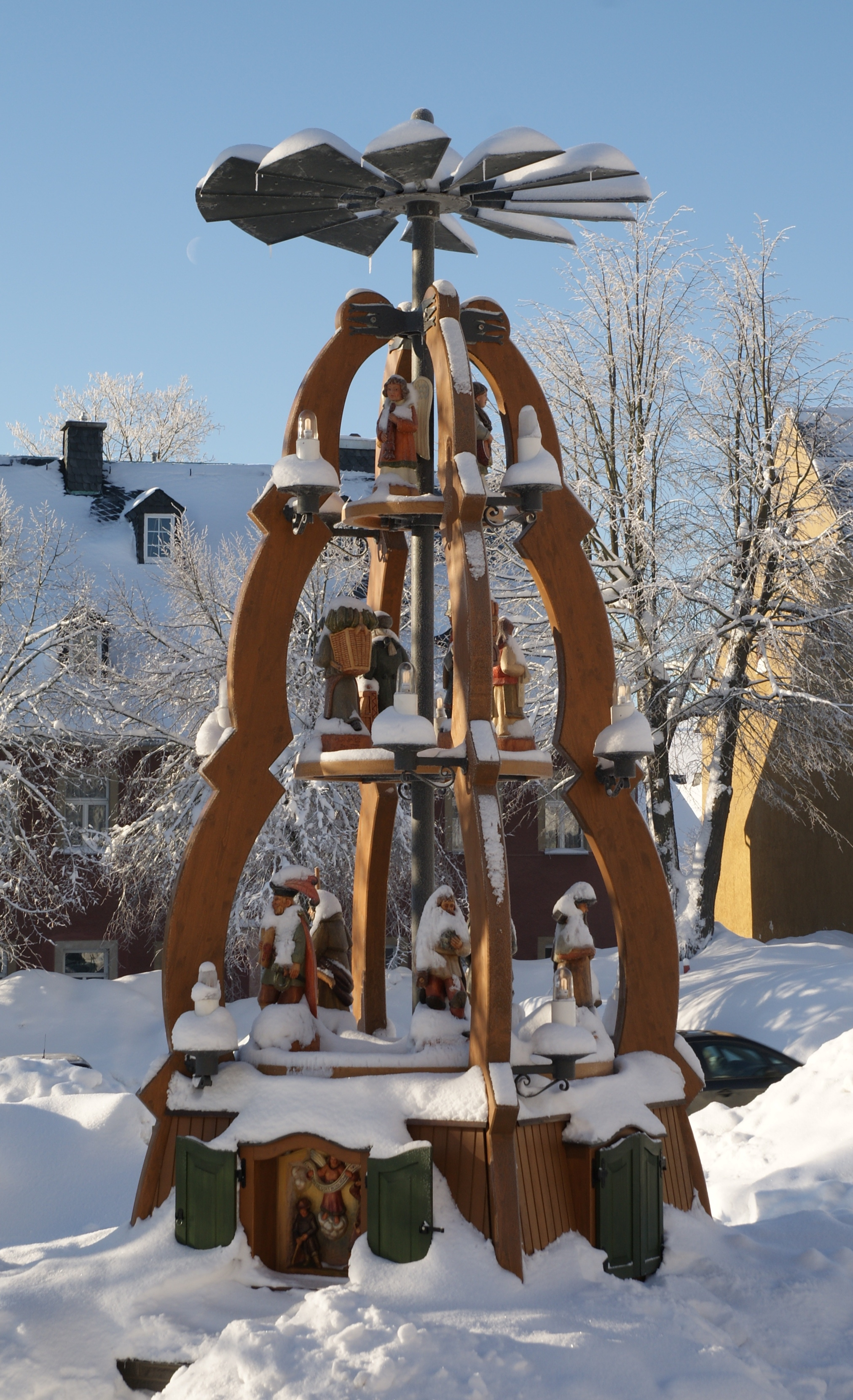 Ortspyramide Jöhstadt